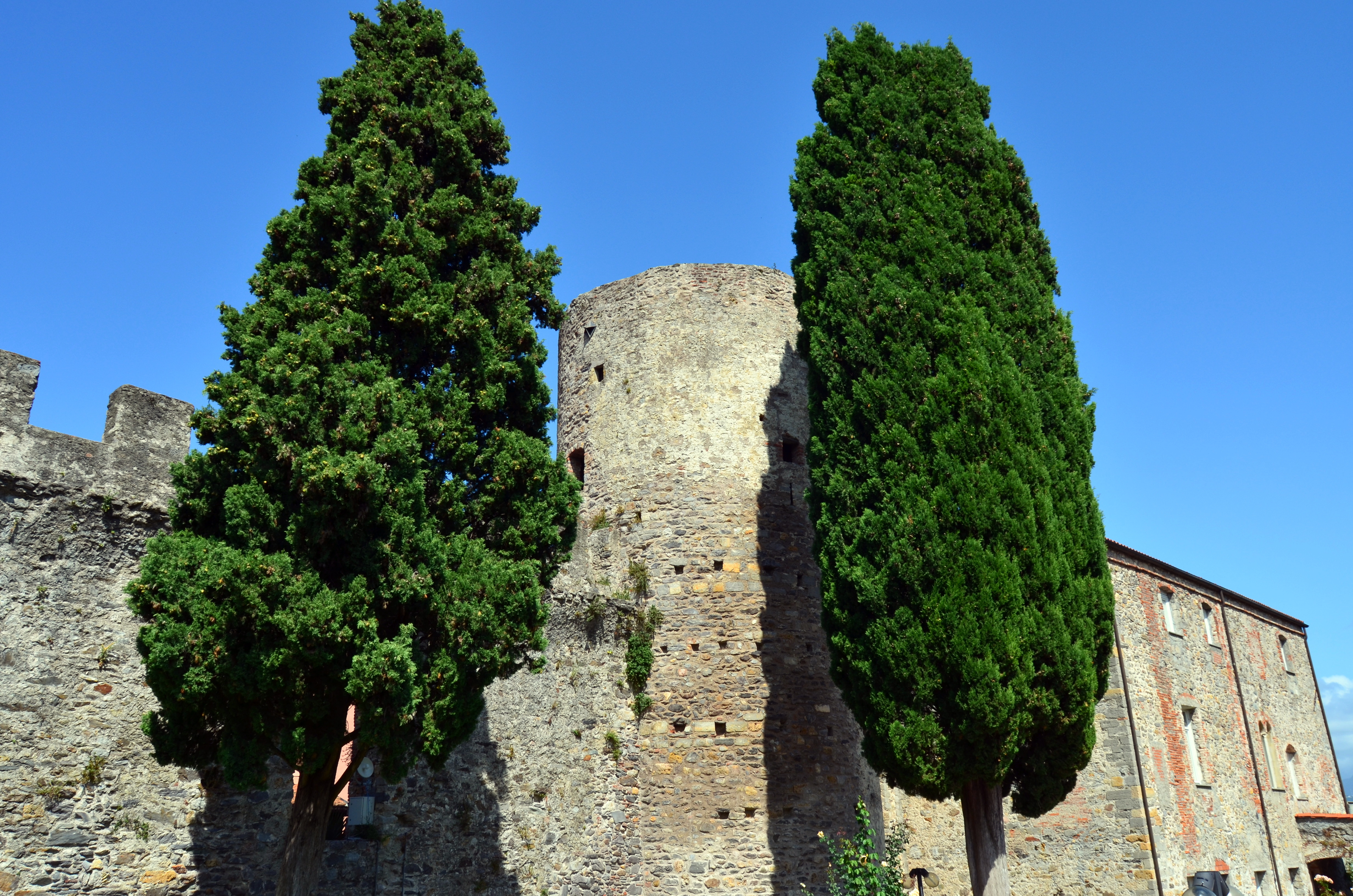 Serie di immagini del castello di Ameglia, Liguria, Italia